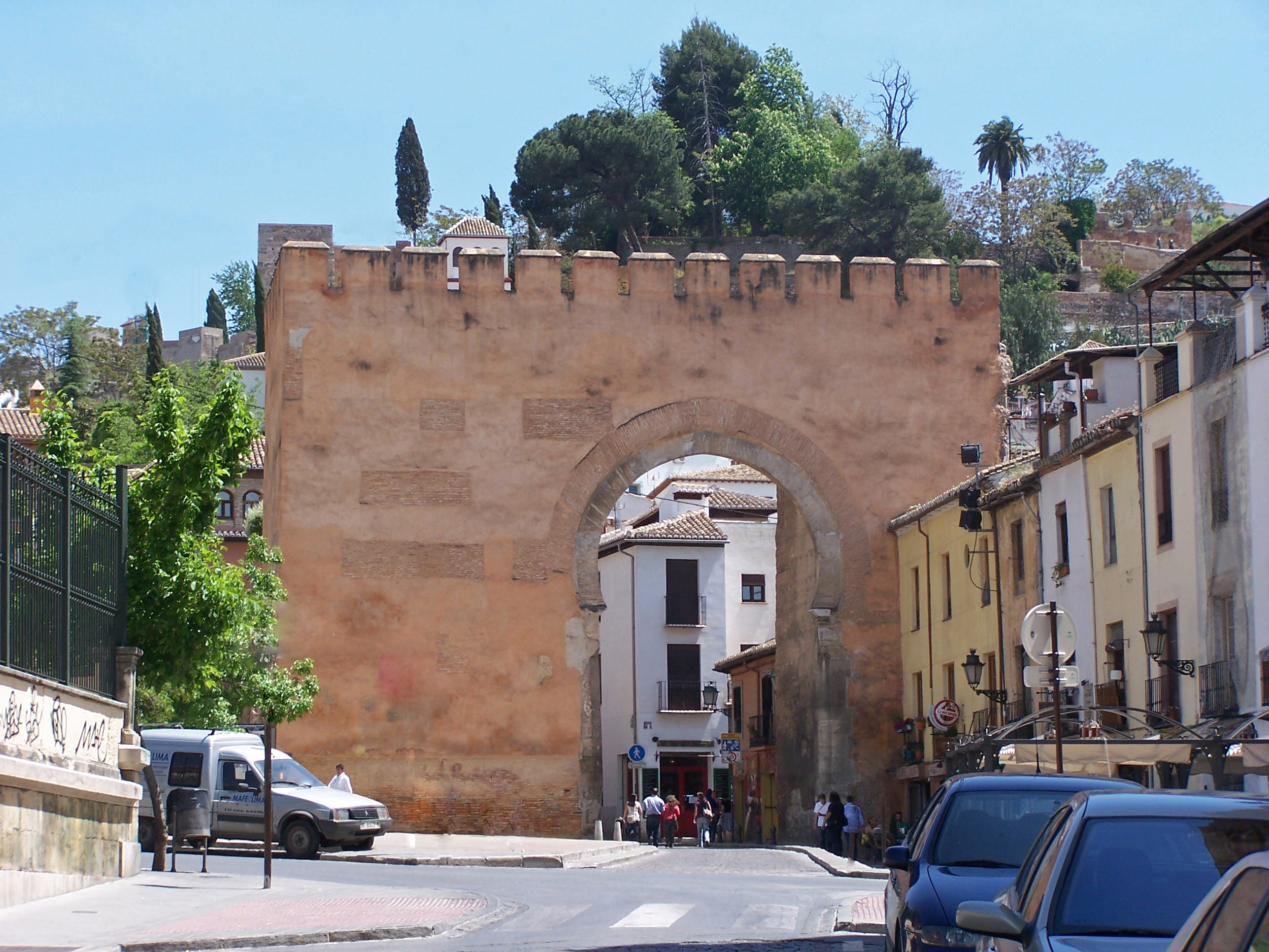 Granada, vista del Arco de Elvira desde la calle del Profesor Emilio Orozco